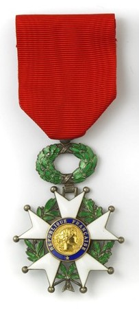 Les insignes de chevalier de l'Ordre National de la Légion d'Honneur